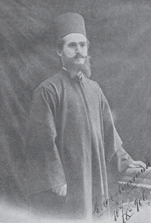 Dyakov Evstatii